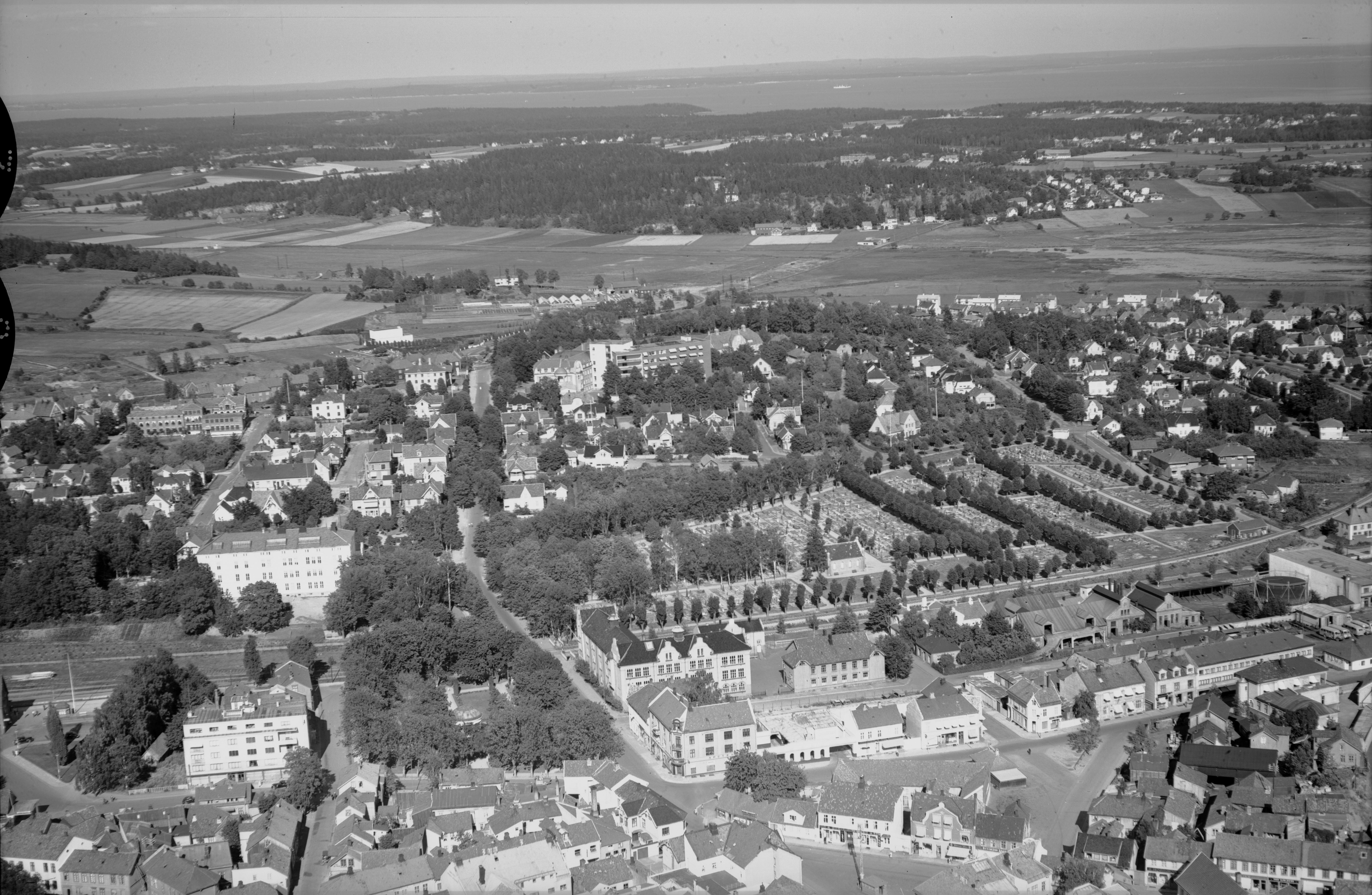 FW.S.10856